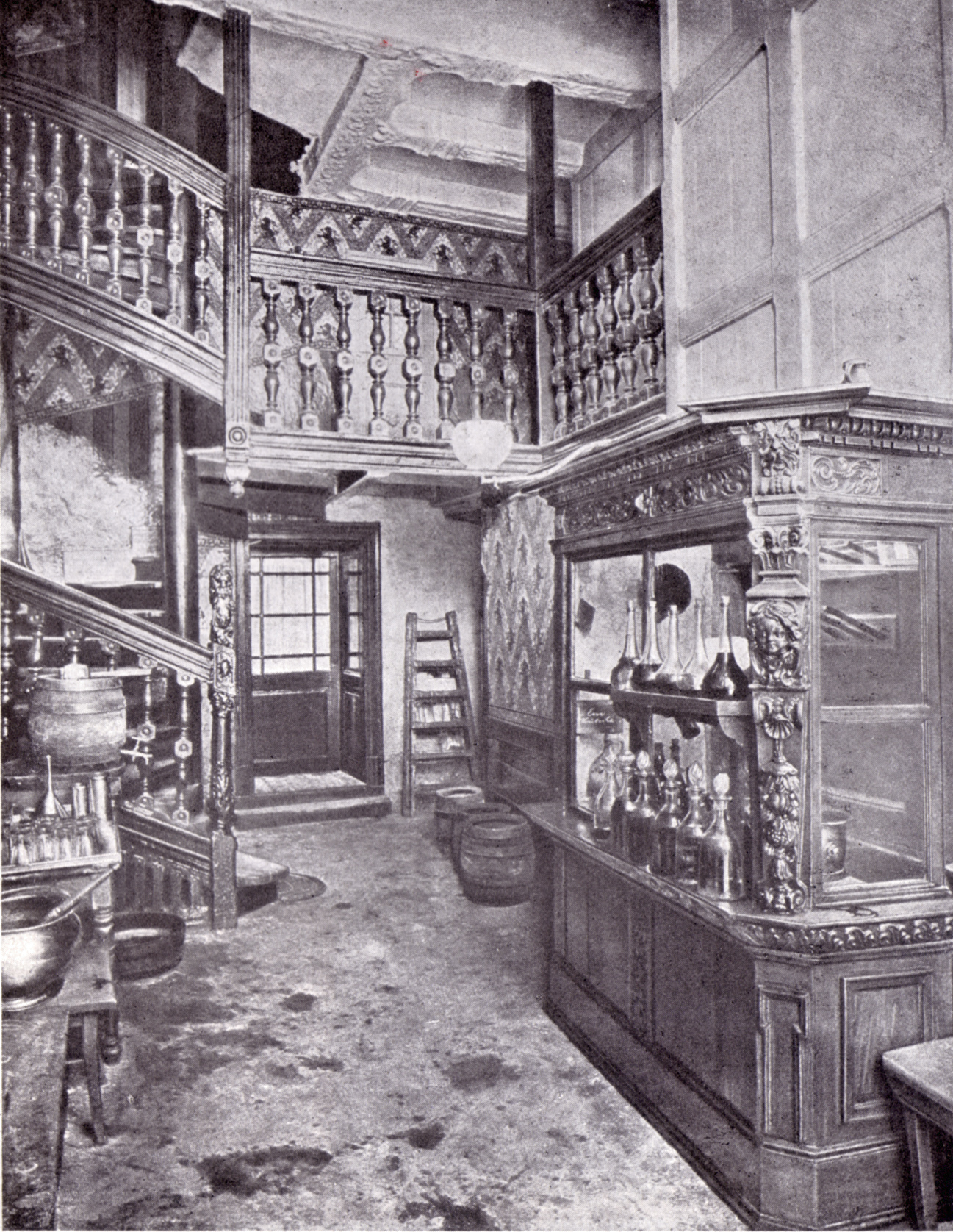 Hausflur mit Thekenschaaf im Brauhaus “Em Krüzge”, Köln